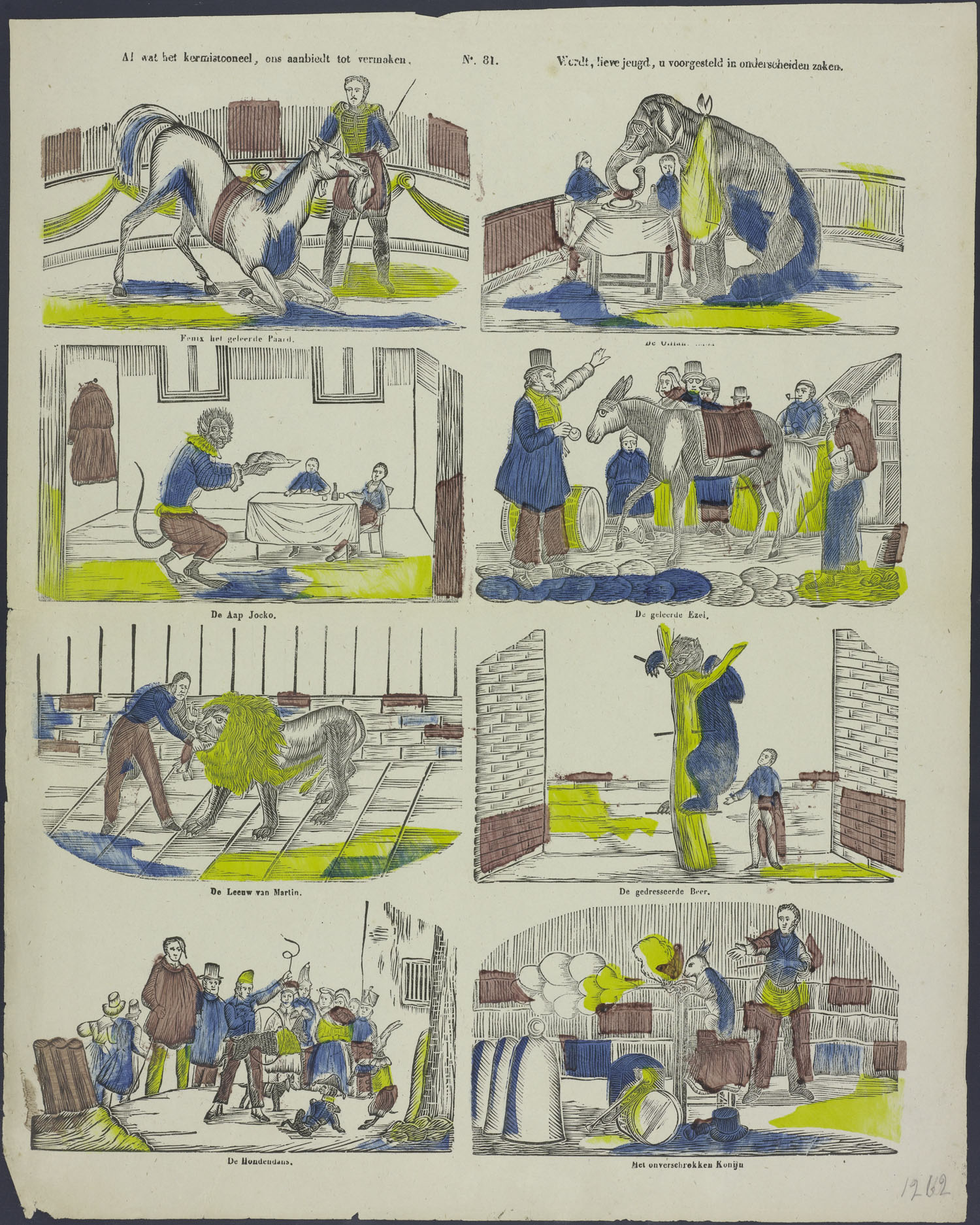 Centsprent met 4 x 2 houtsneden, met afbeeldingen van mensen met gedresseerde dieren: Fenix het geleerde paard (knielend), een dinerende olifant, de aangeklede aap Jocko, de geleerde ezel (kan klokkijken?), de leeuw van Martin, de gedresseerde beer, de hondendans, het onverschrokken konijn (schietend). Bevat korte onderschriften.